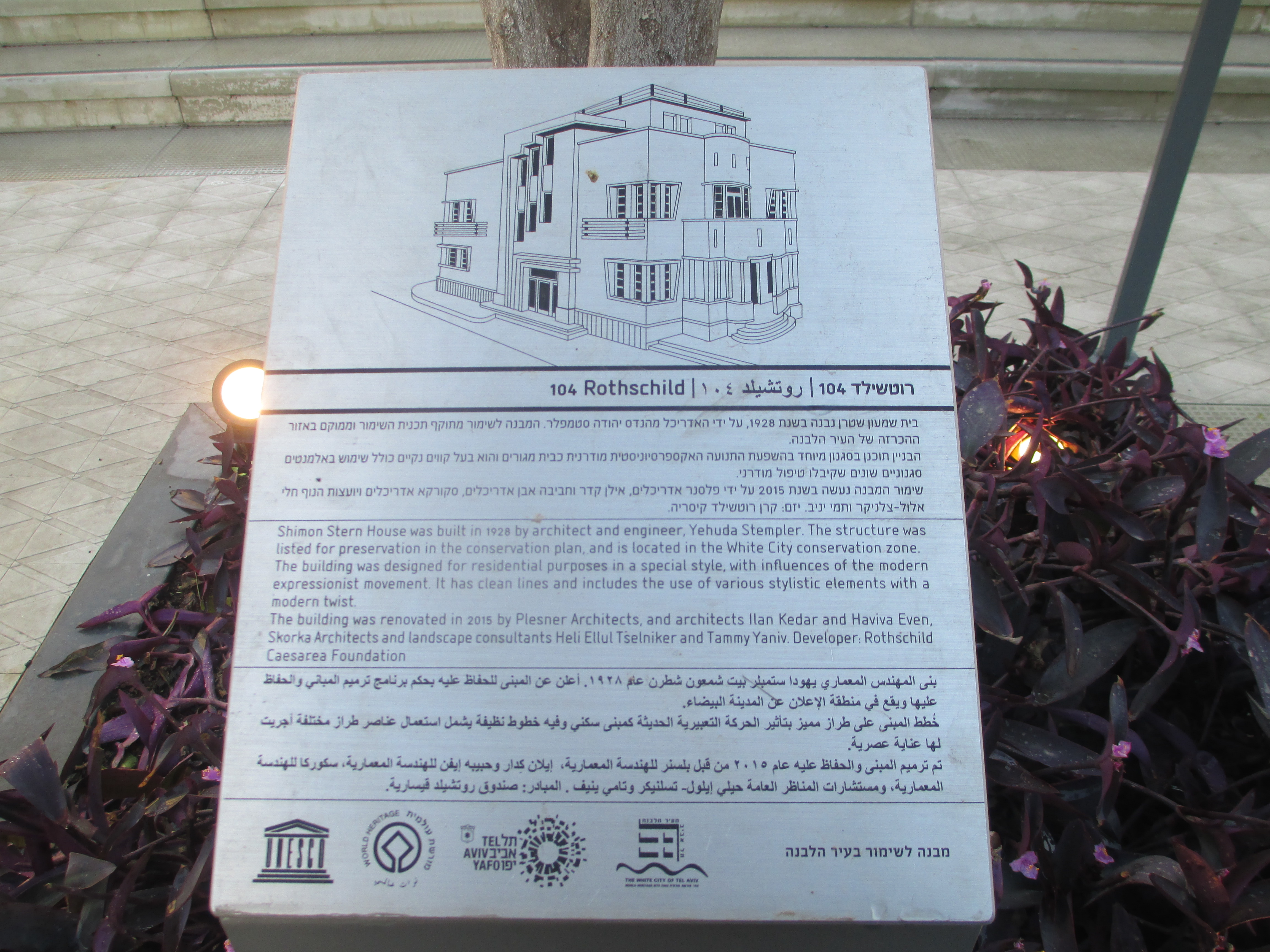 שלט הסבר על בית שמעון שטרן בשדרות רוטשילד 104 בתל אביב